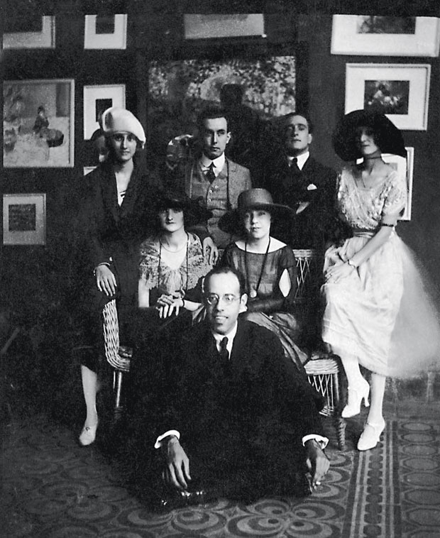 Mário de Andrade (sentado), Anita Malfatti (sentada, ao centro) e Zina Aita (à esquerda de Anita), em São Paulo, Brasil, 1922.